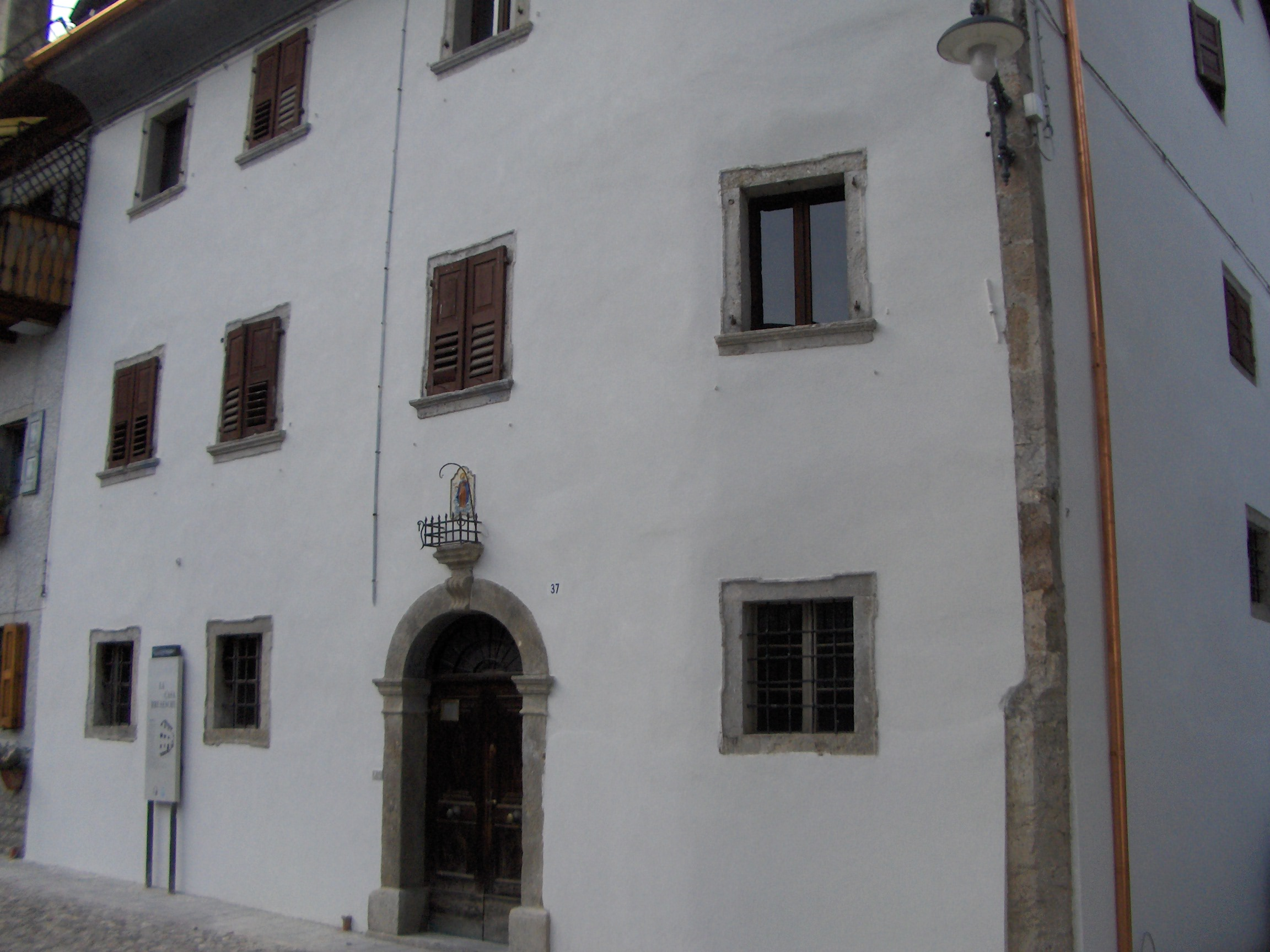 Sebi1, Pesariis (Prato Carnico) Casa Bruseschi